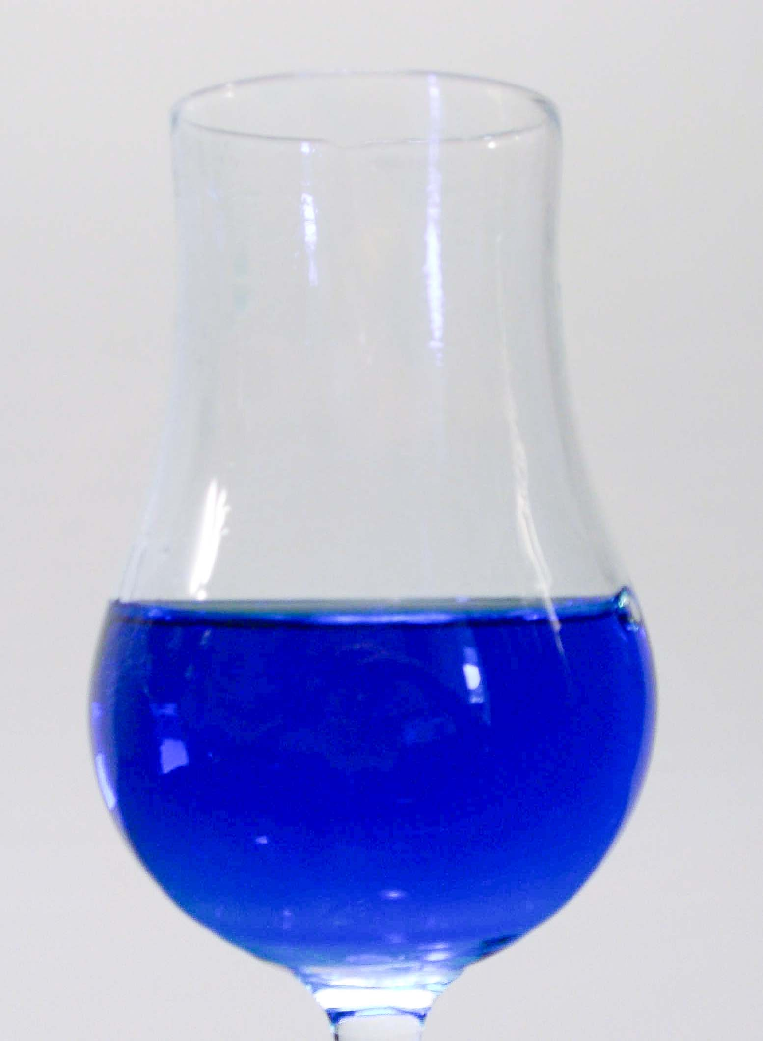 pure Blue Curacao